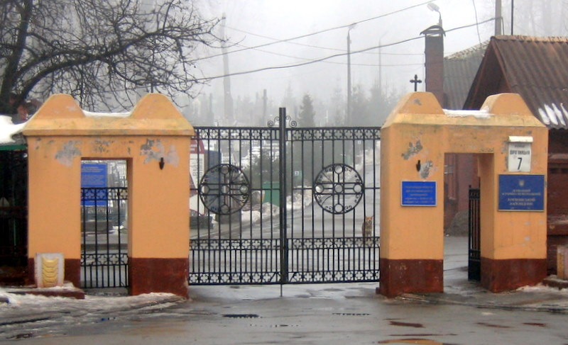 Центральний вхід на Лук'янівьке кладовище у Києві